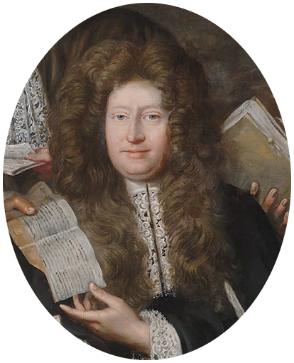 François Doubleth (1642-1688), advocaat, schout, schepen en burgemeester van Den Haag. Drossaart, kastelein en dijkgraaf van Gorinchem en het Land van Arkel, baljuw van Hardinxveld, ontvanger-generaal van de Republiek der Verenigde Nederlanden.